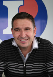 Jean-Philippe Pugens, président du FC Marmande 47